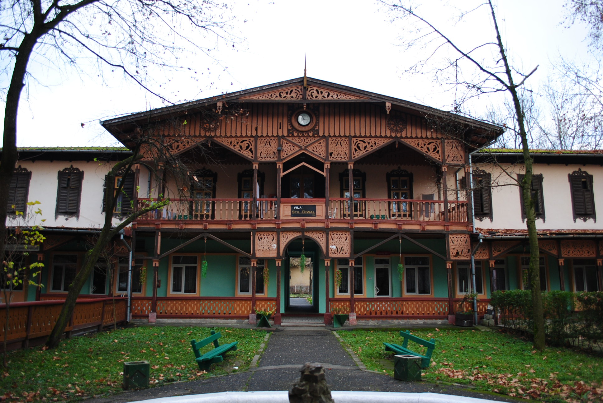 Ansamblul de arhitectură balneară "Zona cu parcul", cu colonada, 1811 - 1870